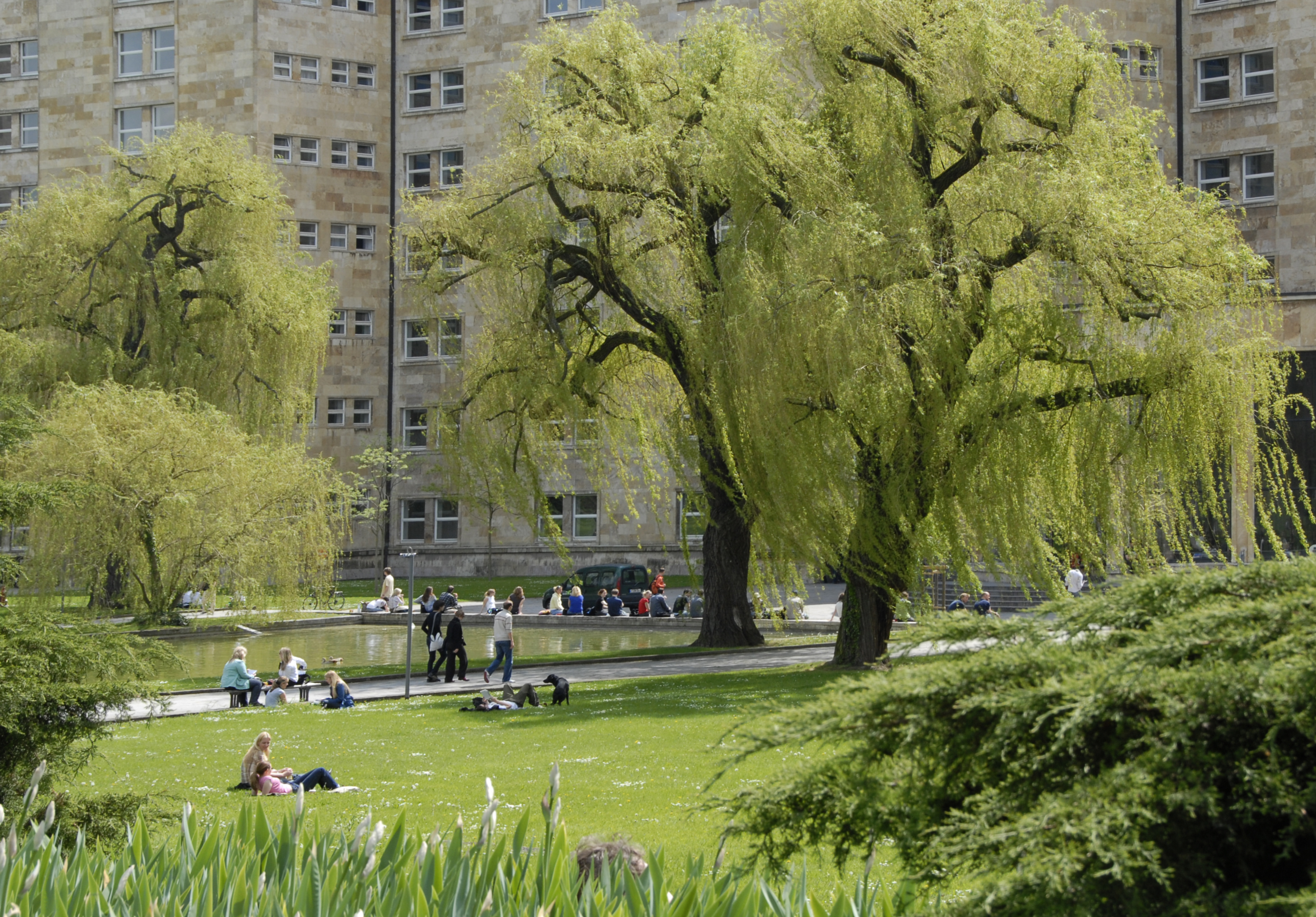 Campus Westend der Goethe-Universität, Park vor dem IG-Hochhaus